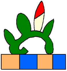 escudo oficial del municipio de ixmiquilpan, hidalgo, mexico